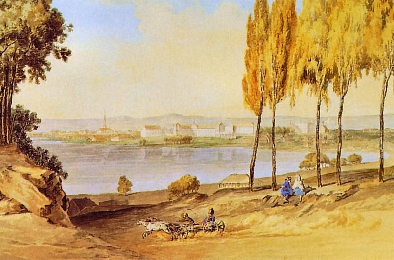 Józef Peszka